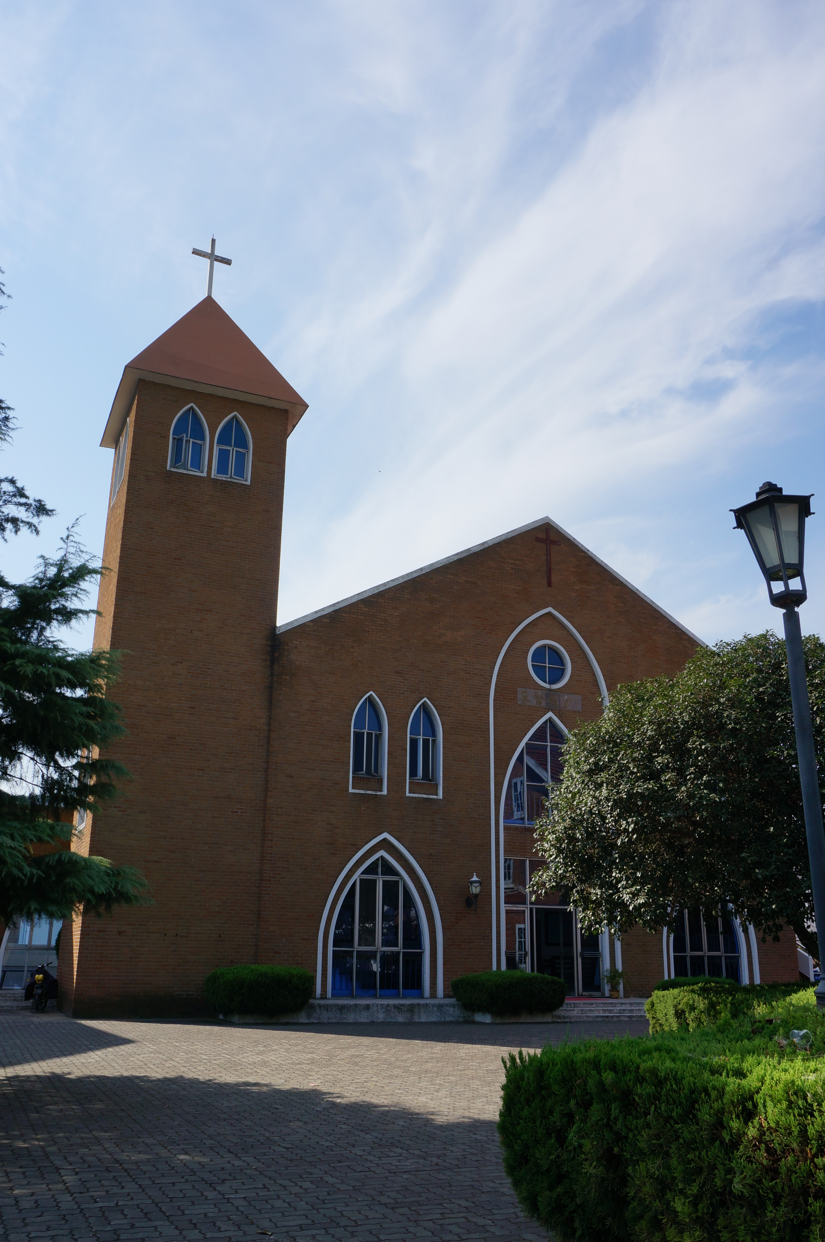 常熟基督教堂，东侧。